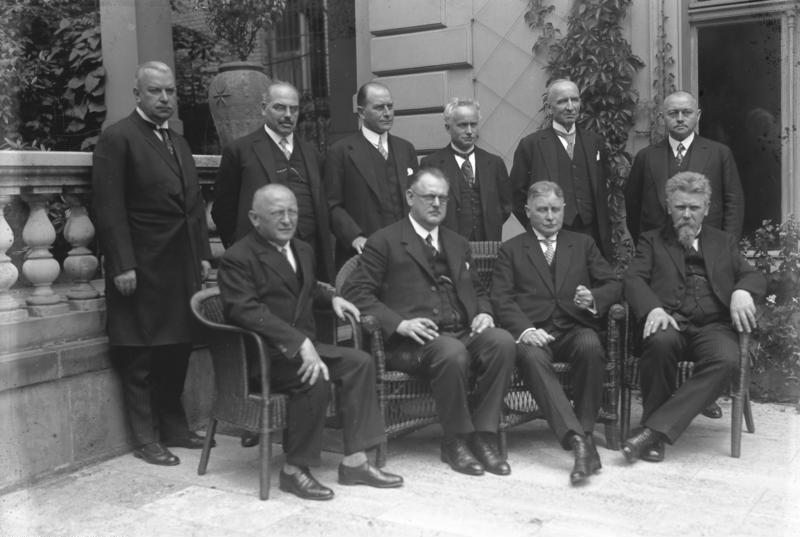 Reichskanzler a.D. Hermann Müller tot! [Anm: † 20. März 1931 in Berlin] Das Reichskabinett Müller während seiner letzten Reichskanzlerschaft. Information added by Wikimedia users.Kabinett Hermann Müller II 28. Juni 1928 – 27. März 1930